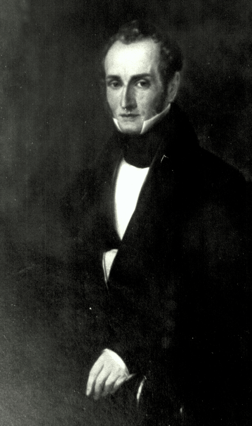 Porträt von Charles James Cockerill